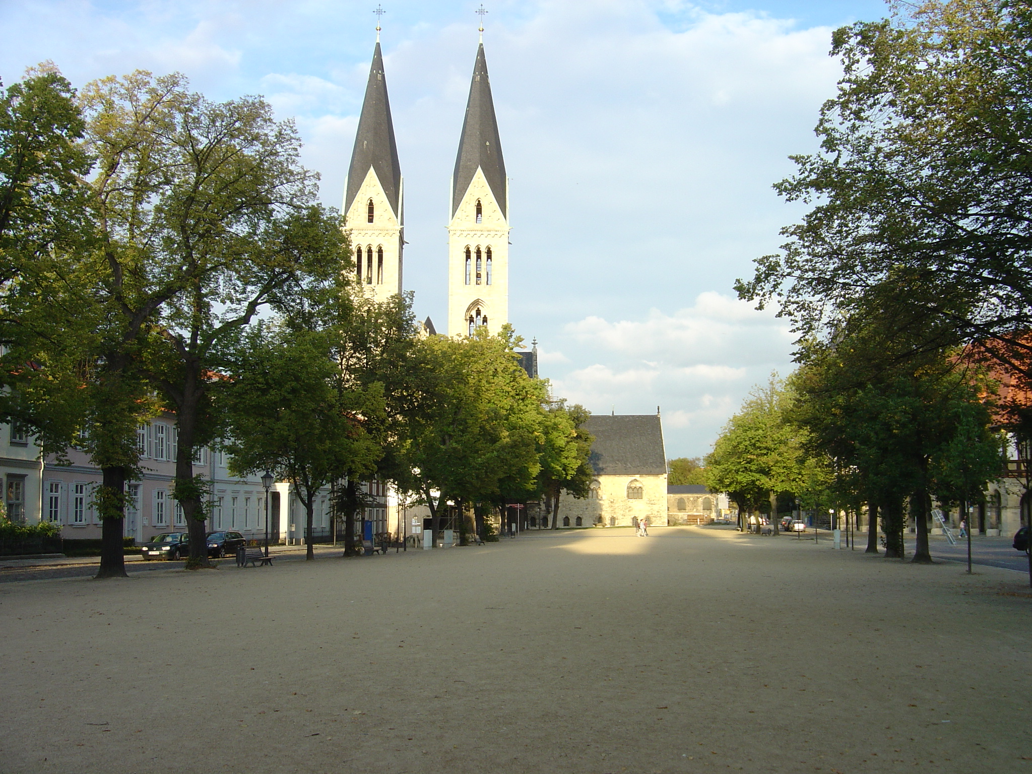 Halberstädter Domplatz, Blickrichtung Osten